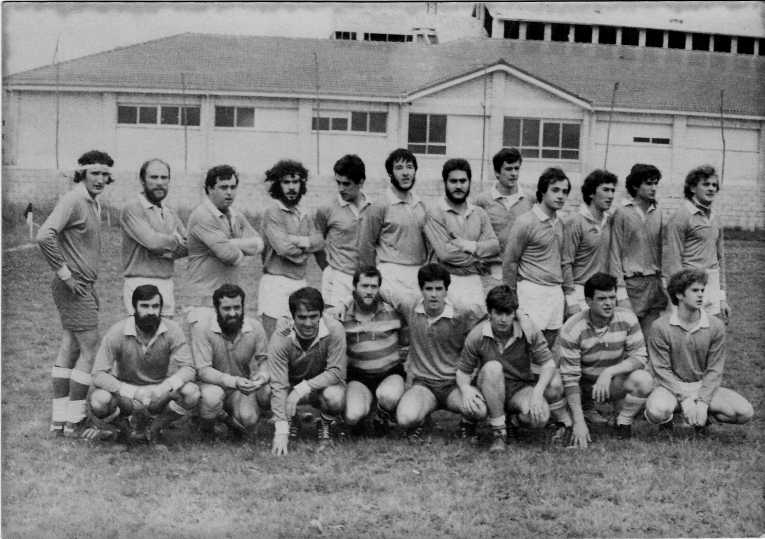 Eibar Rugby Taldea en el Campeonato Triangular de Zarautz en 1980. Eibar Rugby Taldea en el Campeonato Triangular de Zarautz en 1980.